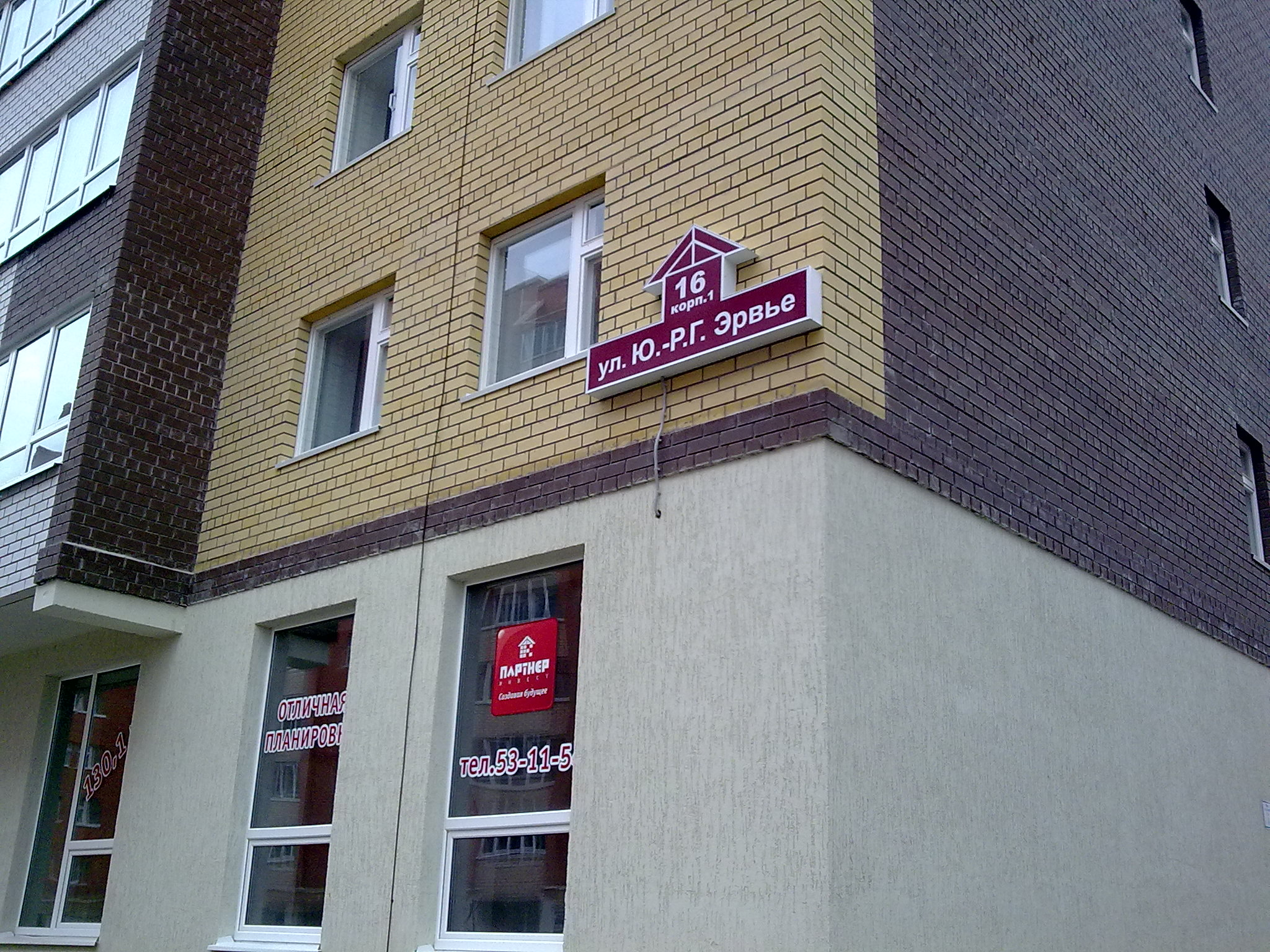 Domo en strato Ervje. Tjumeno, Rusio.